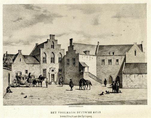 Gezicht op de gebouwen van het Duitse Huis aan de Springweg te Utrecht vanaf het binnenplein, uit het oosten.